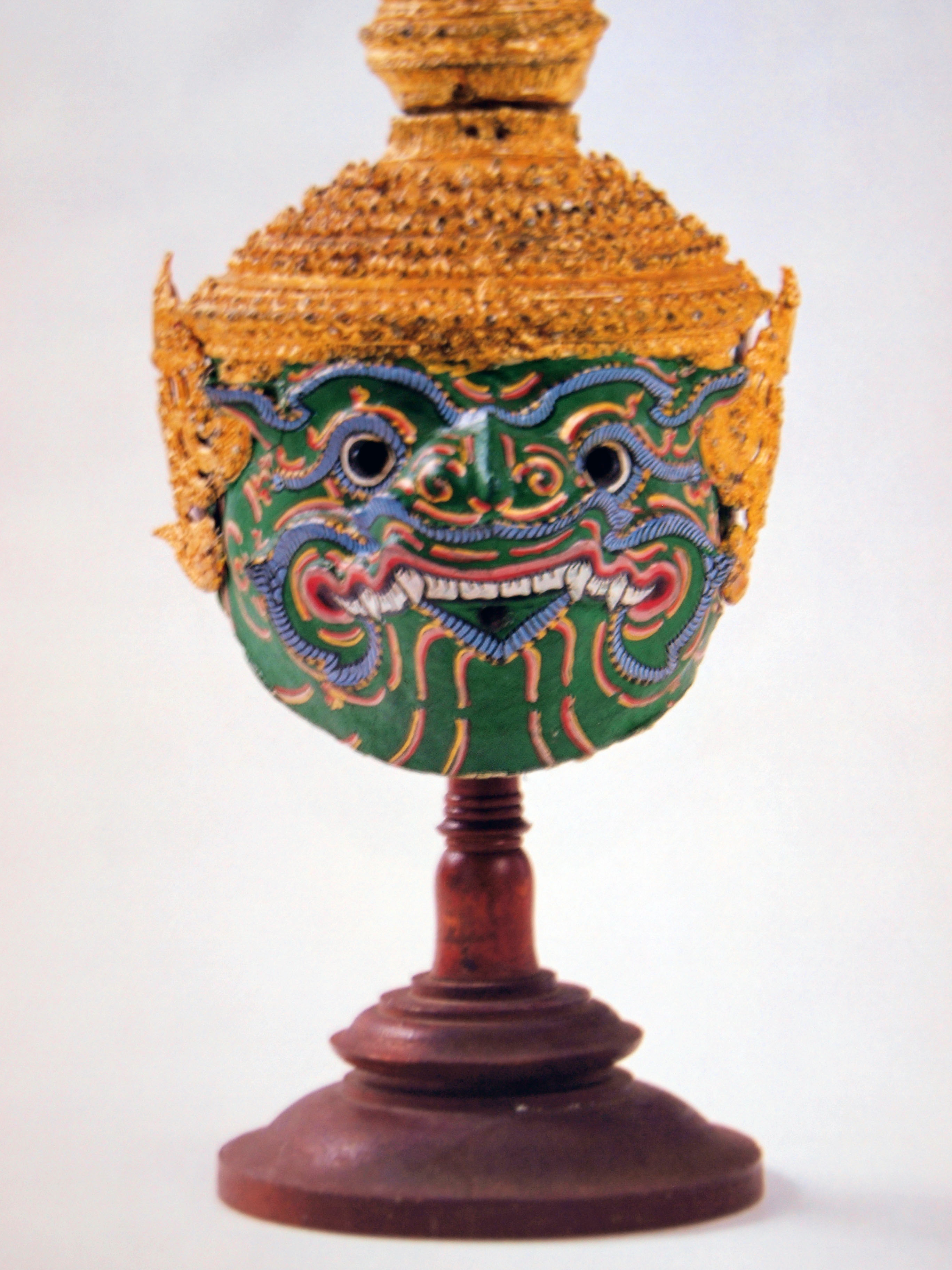 ภาพถ่ายหัวโขนองคต ถ่ายจากคัตเอาท์ประกอบการแสดงหัวโขนของกรมศิลปกร